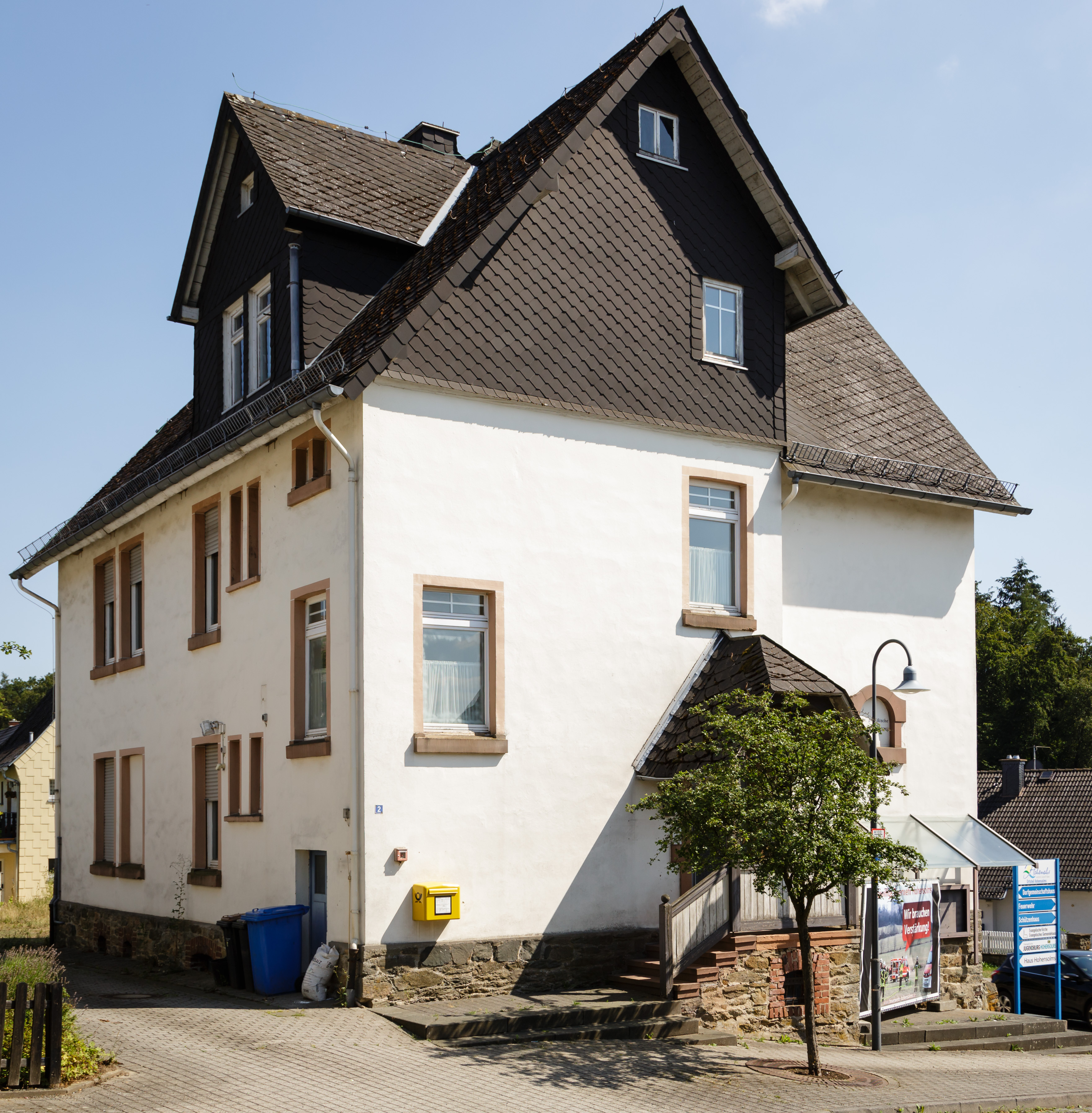 Kulturdenkmal Hauptstraße 2 in Hohensolms (Ehemalige Bürgermeisterei)